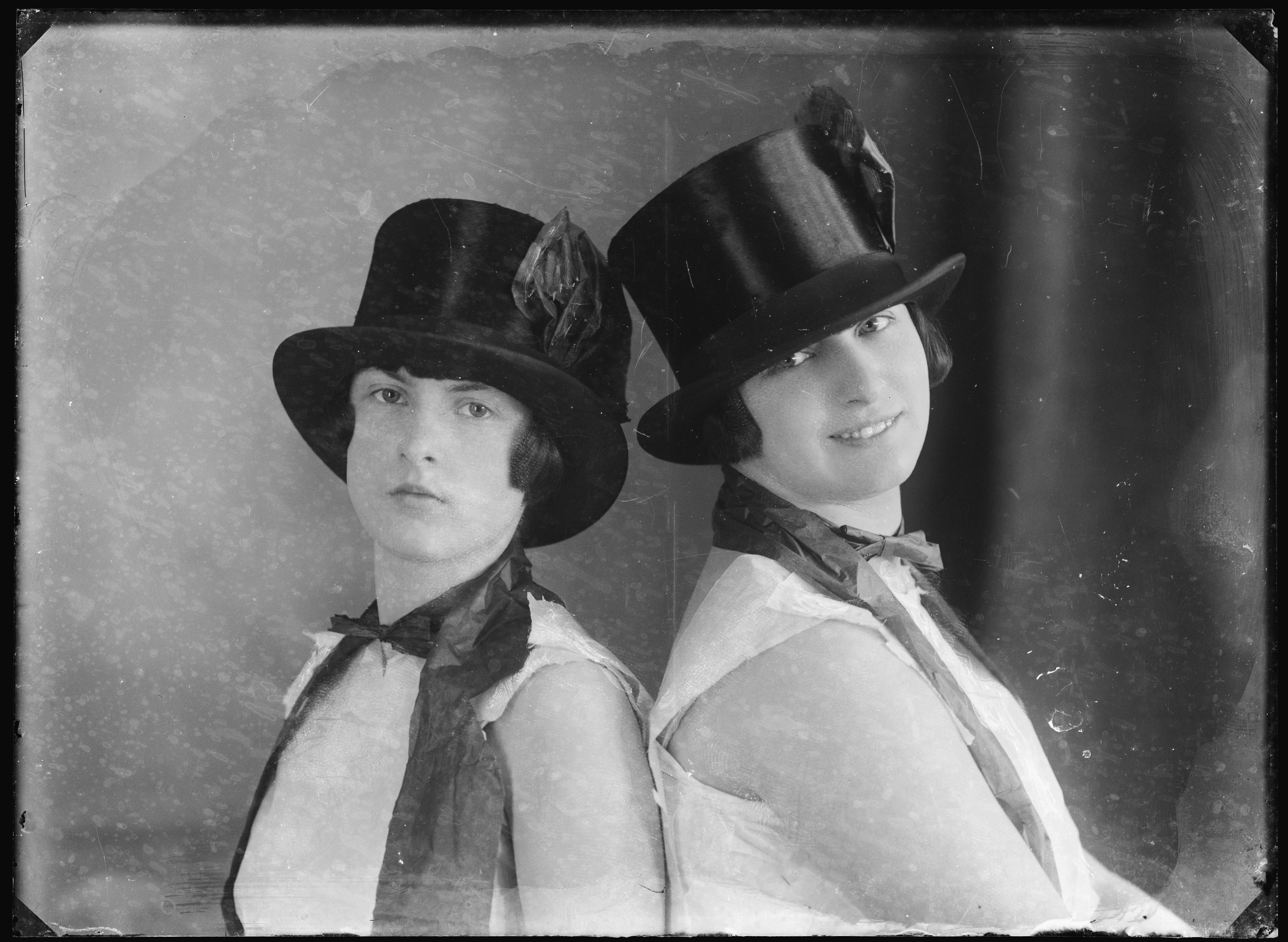 Een portret van de zussen Tonny en Sophie Vlaanderen. De foto werd gemaakt in de fotostudie van hun vader (Leonard Vlaanderen 1871-1941). Deze foto werd gemaakt in ca. 1925.